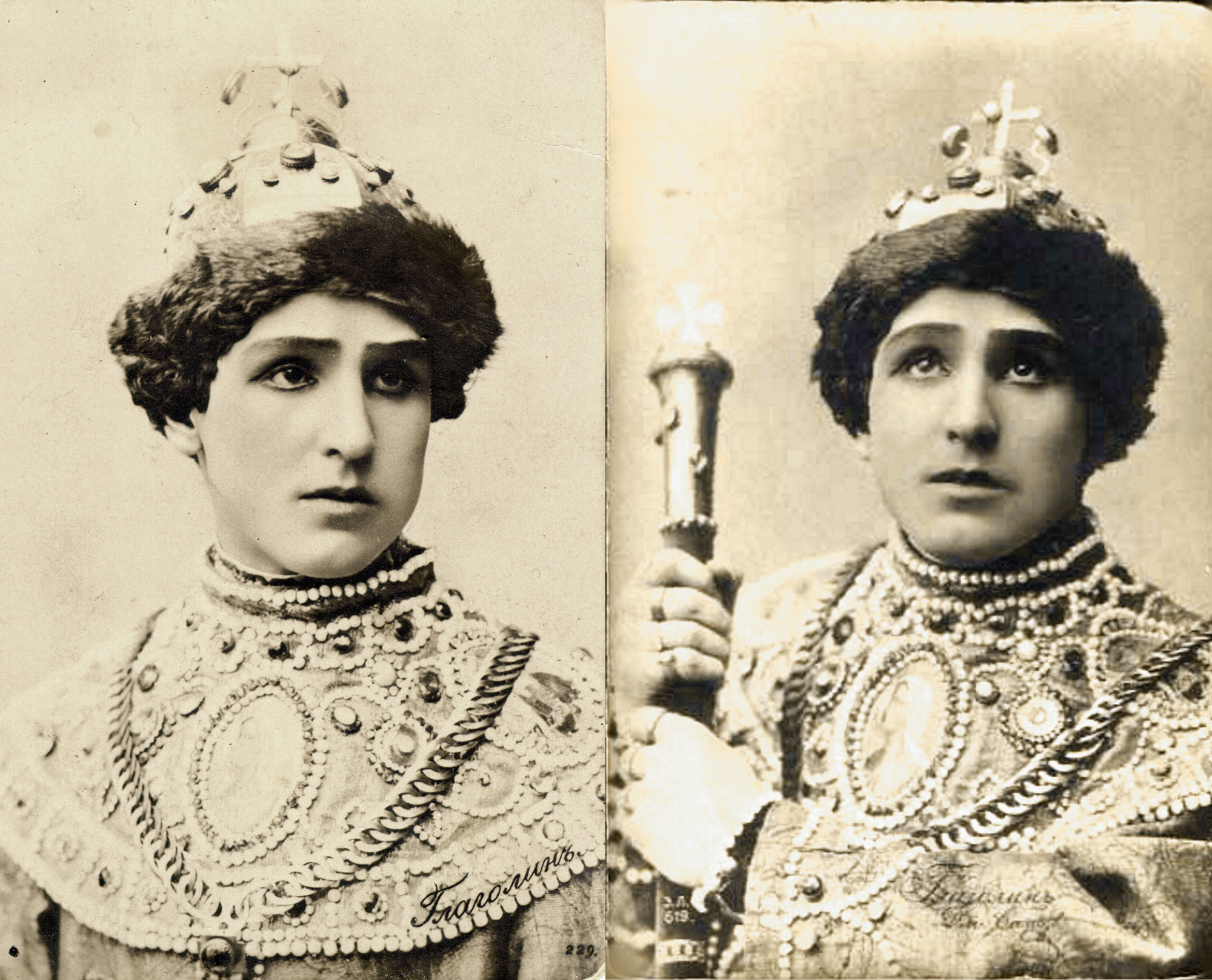 Открытка "Б. Глаголин в роли царя Фёдора в спектакле "Царь Фёдор Иоаннович"